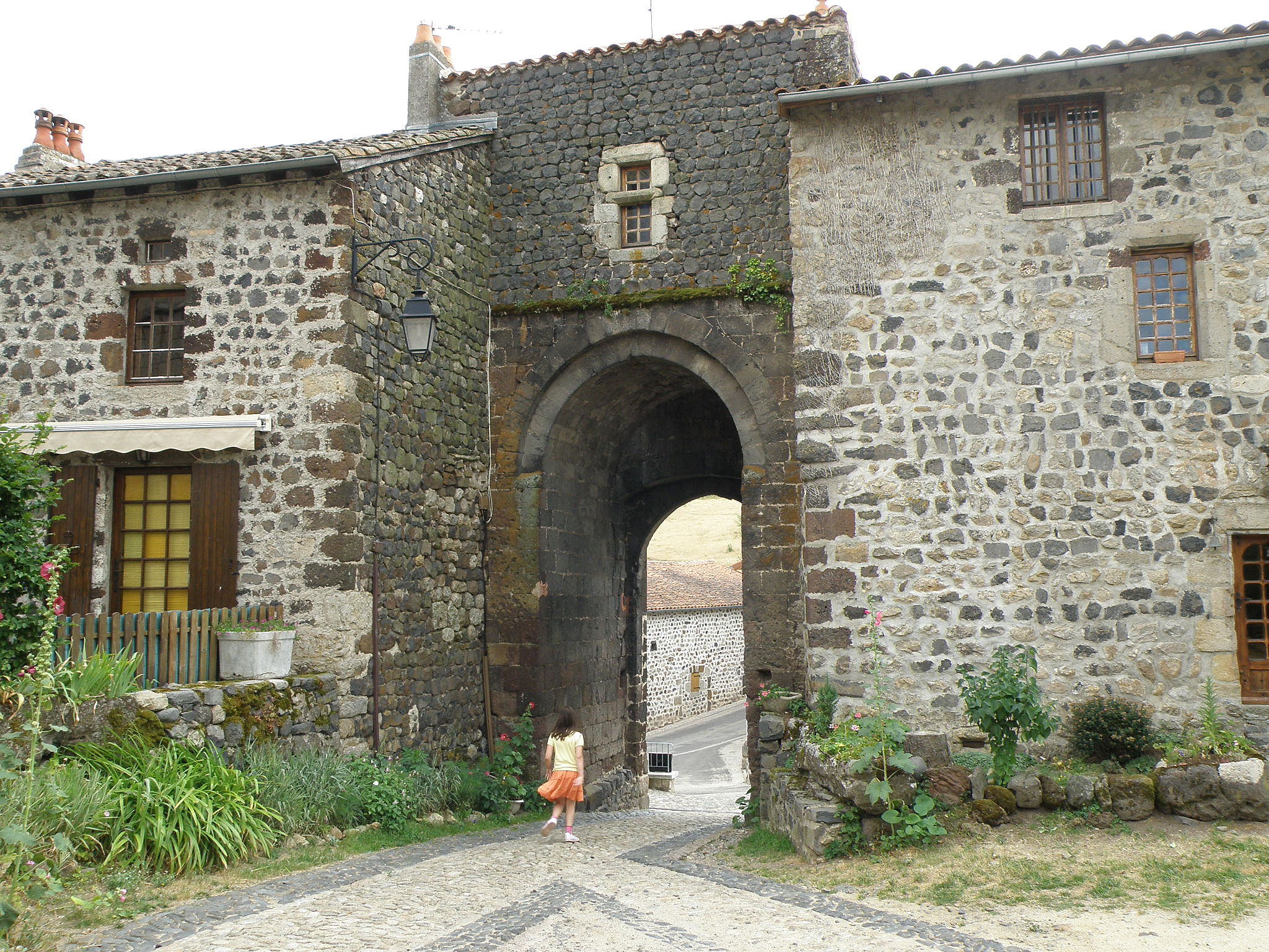 Arlempdes, comm. de la Haute-Loire, France (région Auvergne). La poterne (arche voûtée en berceau brisé), face nord.